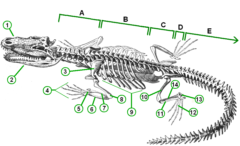 Crocodyle skeleton